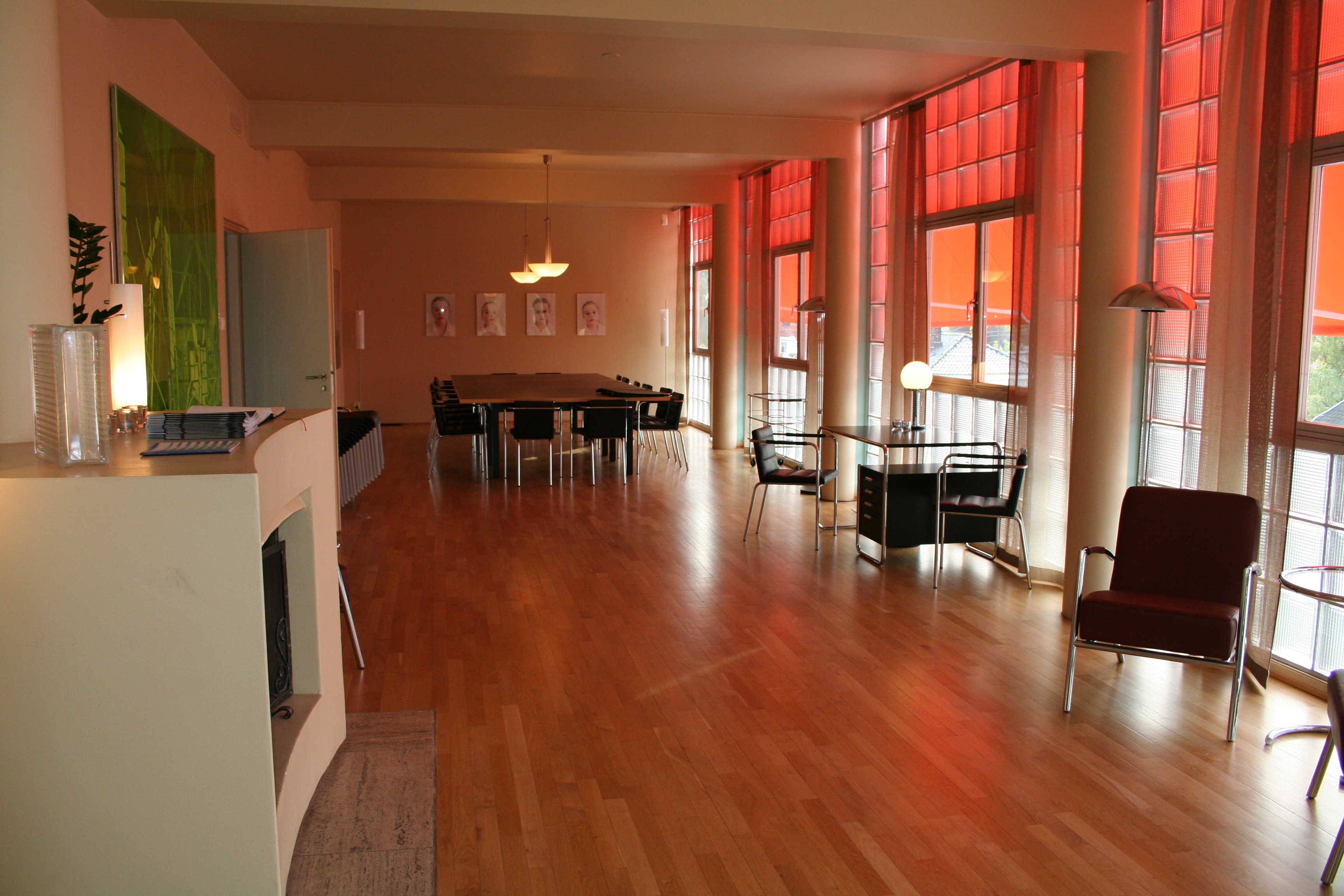 Villa Stenersen, Oslo, Norway. Gallery